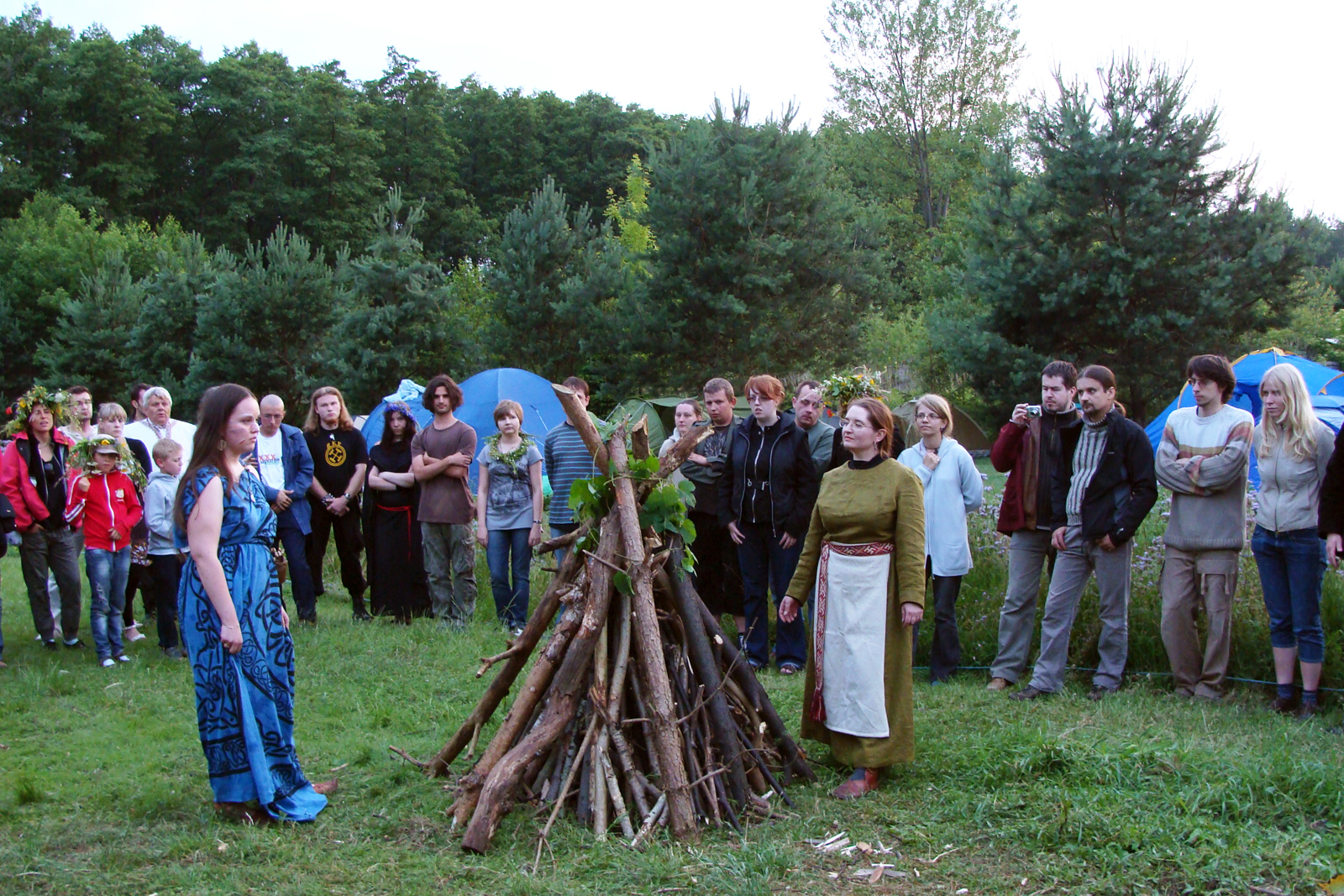 Noc Kupały 2010 Rodzimy Kościół Polski - oficjalne otwarcie święta przez rodzimowierczą żerczynię i zaproszoną przedstawicielkę Międzynarodowej Federacji Pogańskiej (PFI - Pagan Federation International).